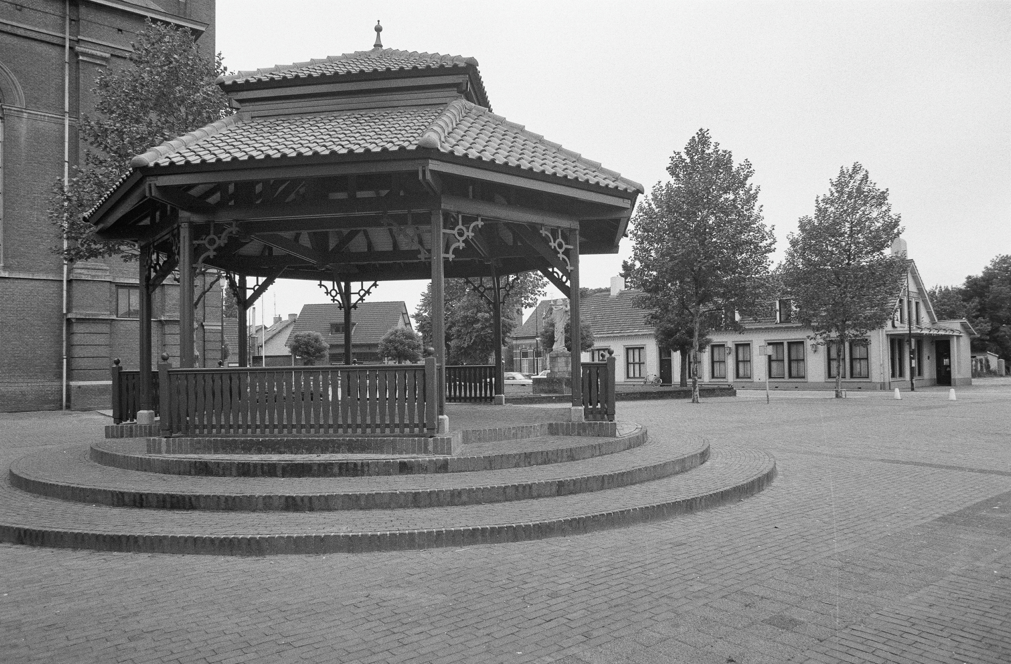 Muziektent: Exterieur OVERZICHT MUZIEKTENT